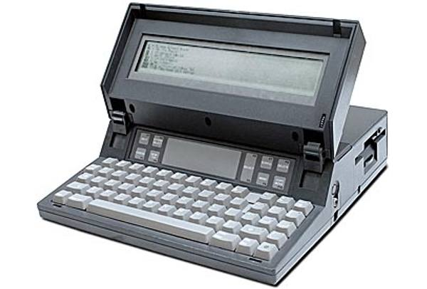 Foto que hice en una exposición del Gavilán SC